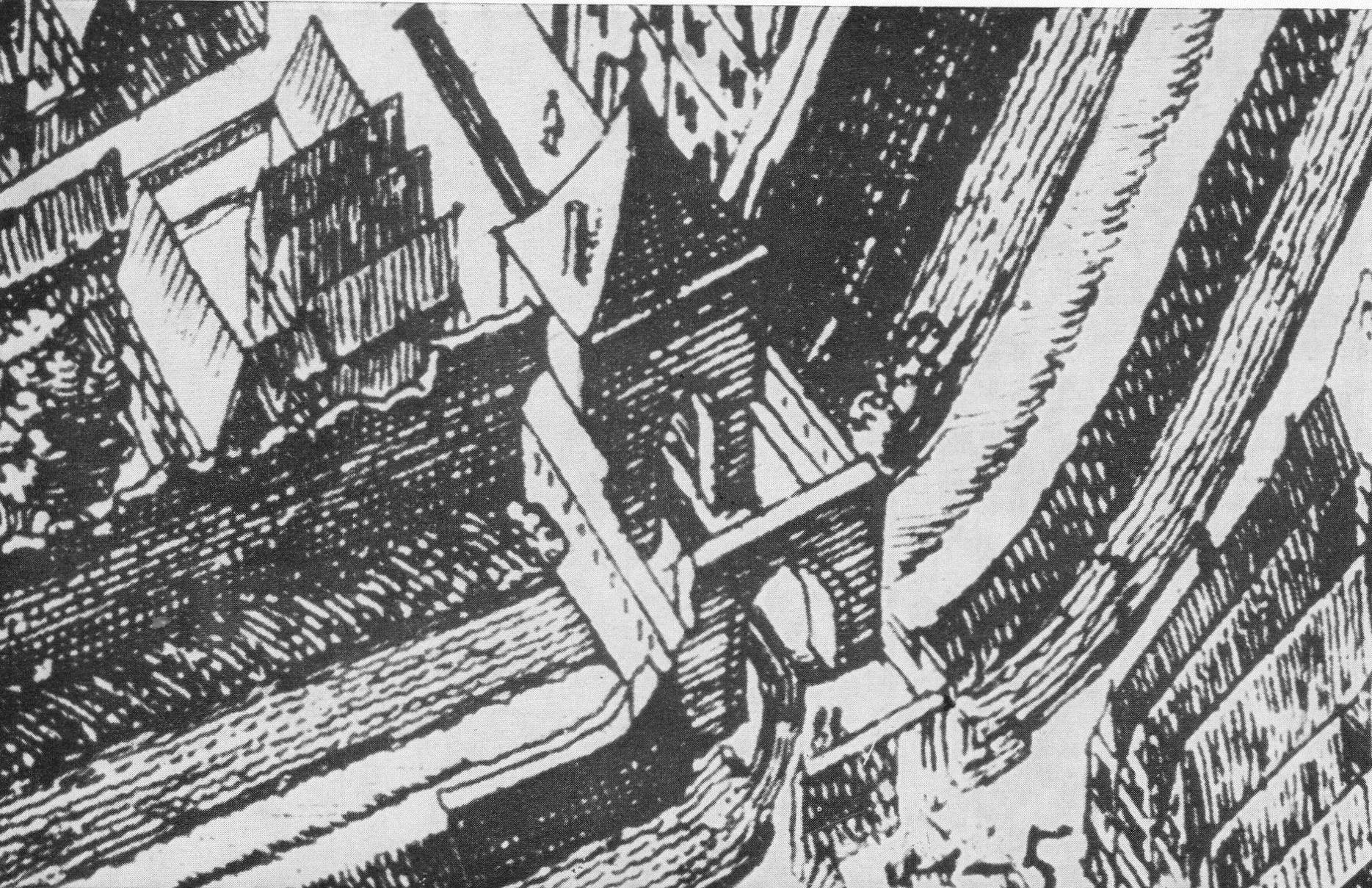 Das Kölntor in Düren, NRW, mit Zwinger un Vortor